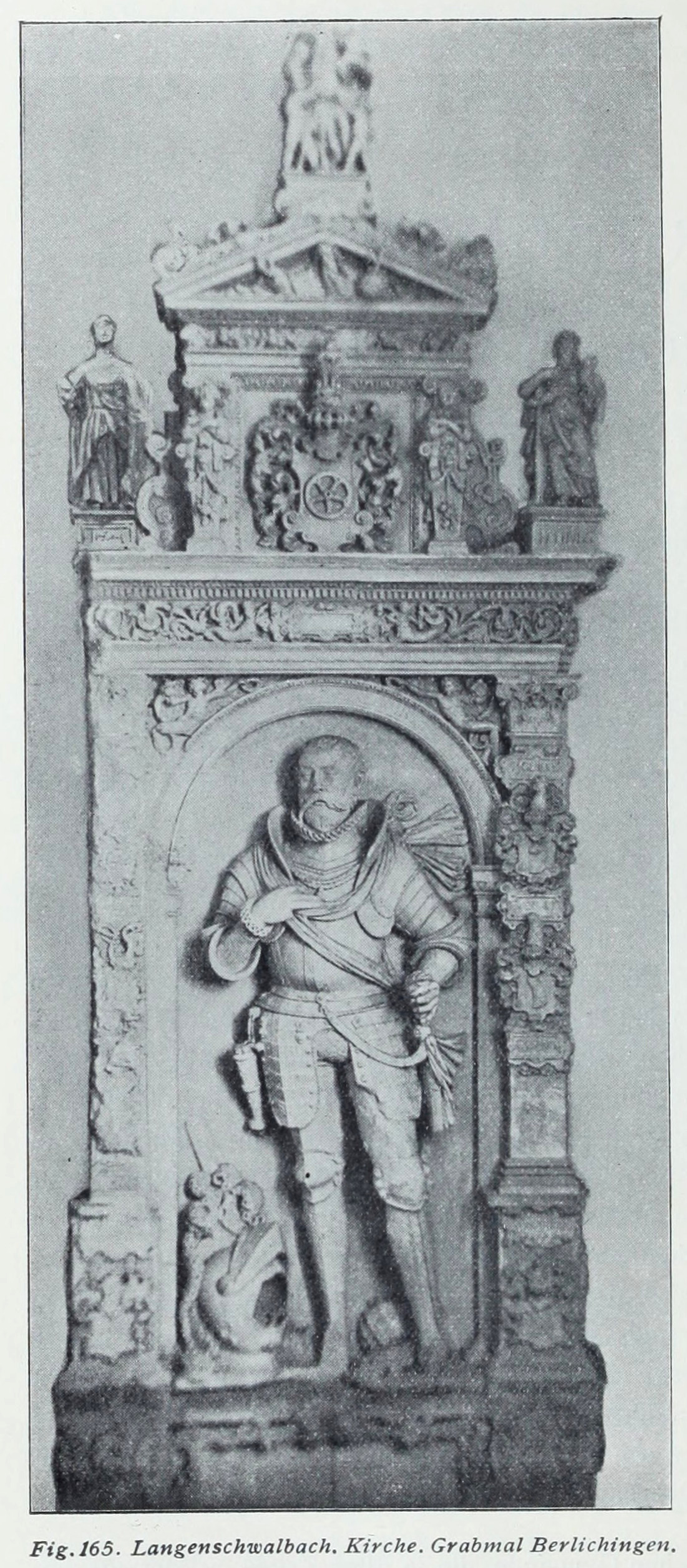 Langenschwalbach Kirche Grabmal Berlichingen